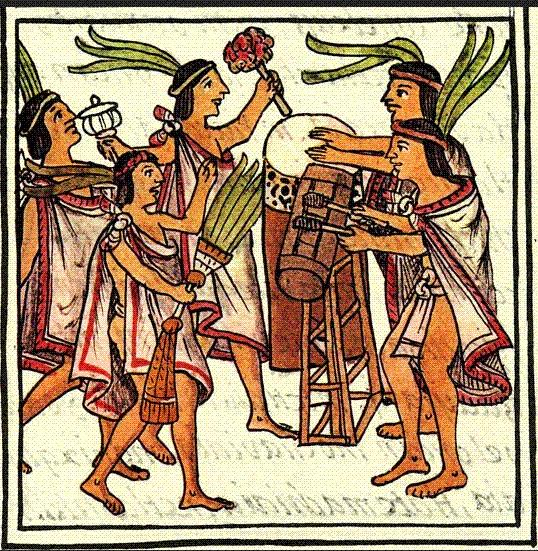 Florentine Codex (16th-century).